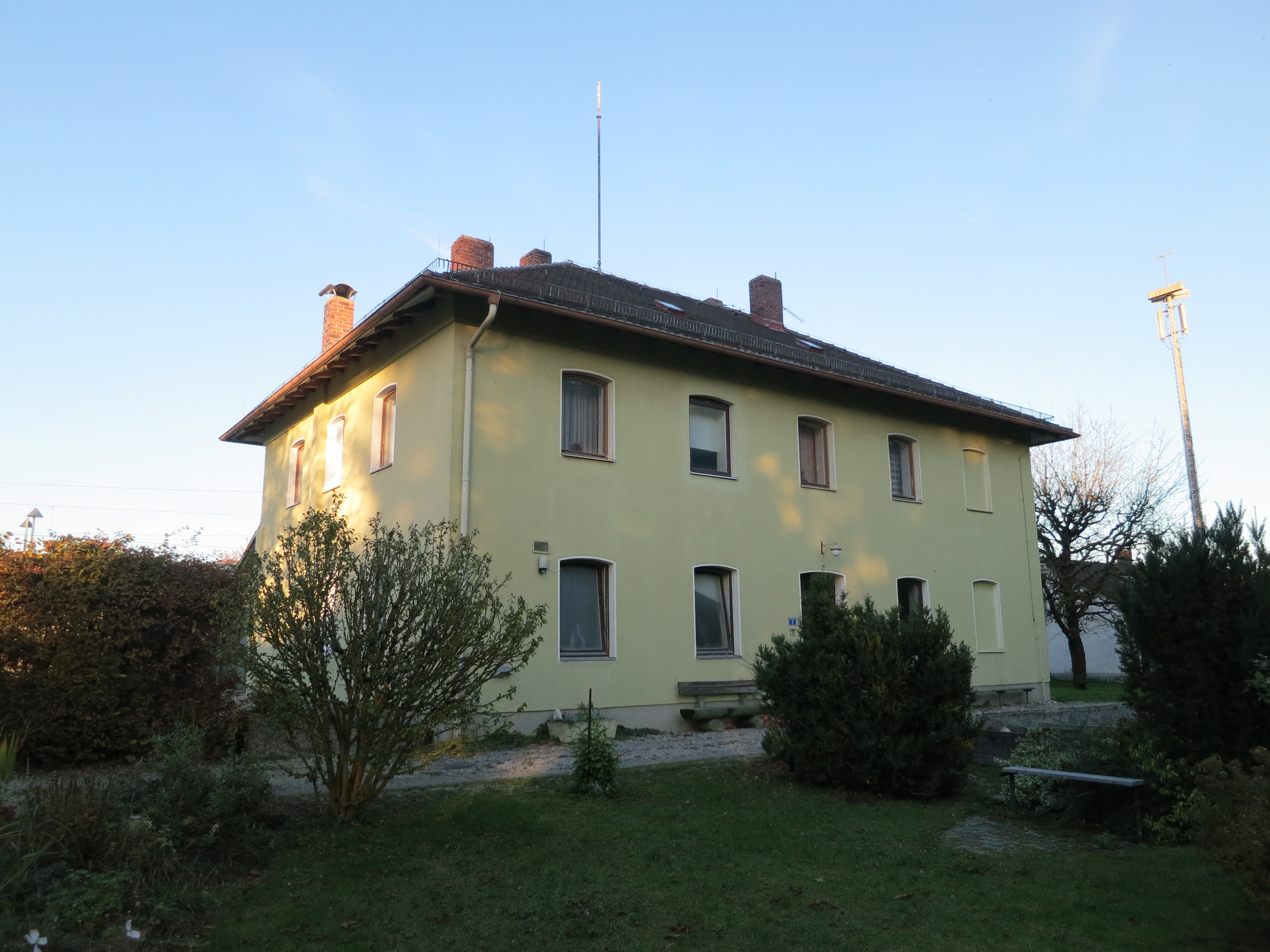 Empfangsgebäude des Bahnhofs Haspelmoor von der Straßenseite